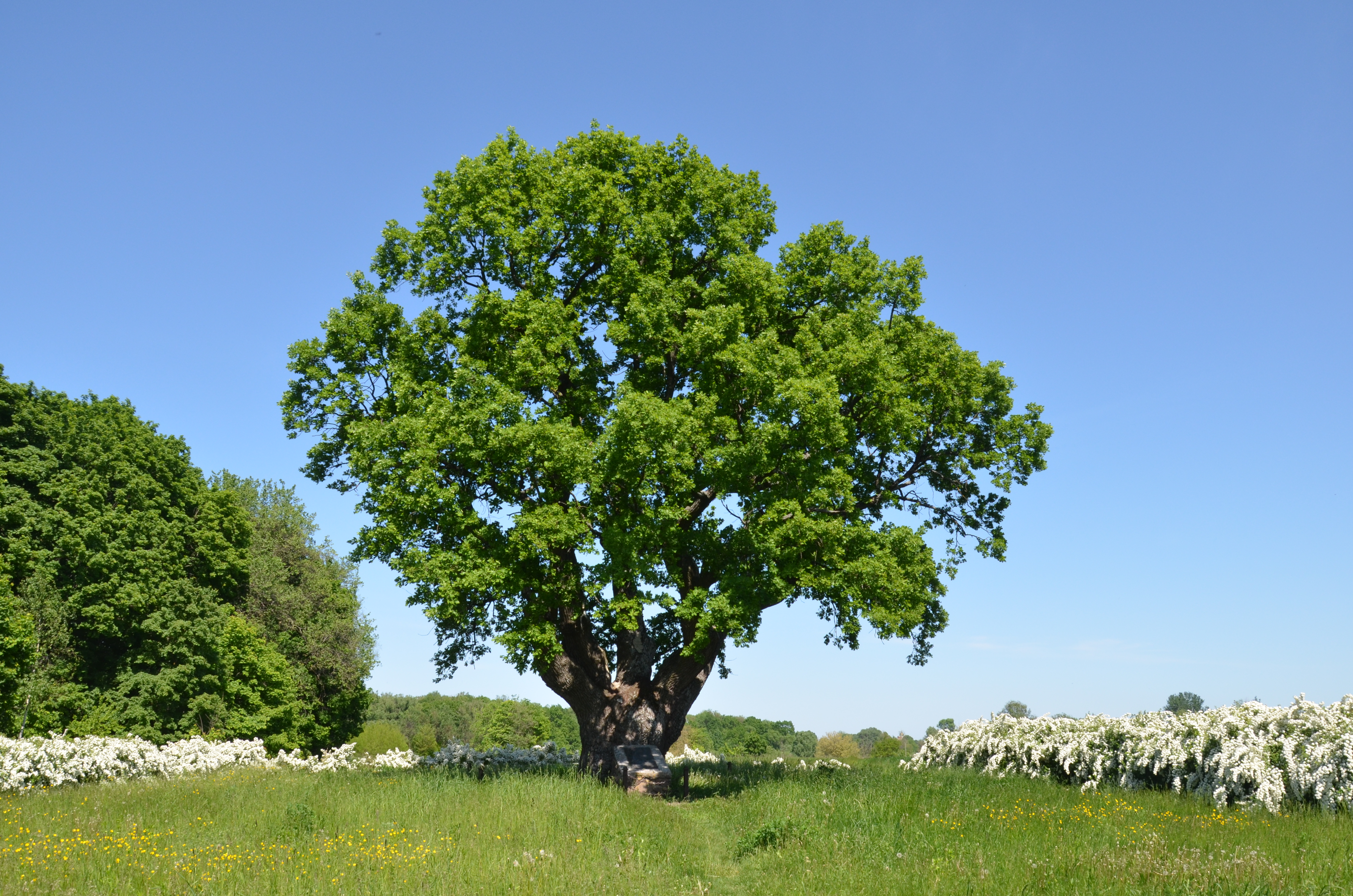 Дуб багатовіковий, Ніжинський район, с. Липів Ріг